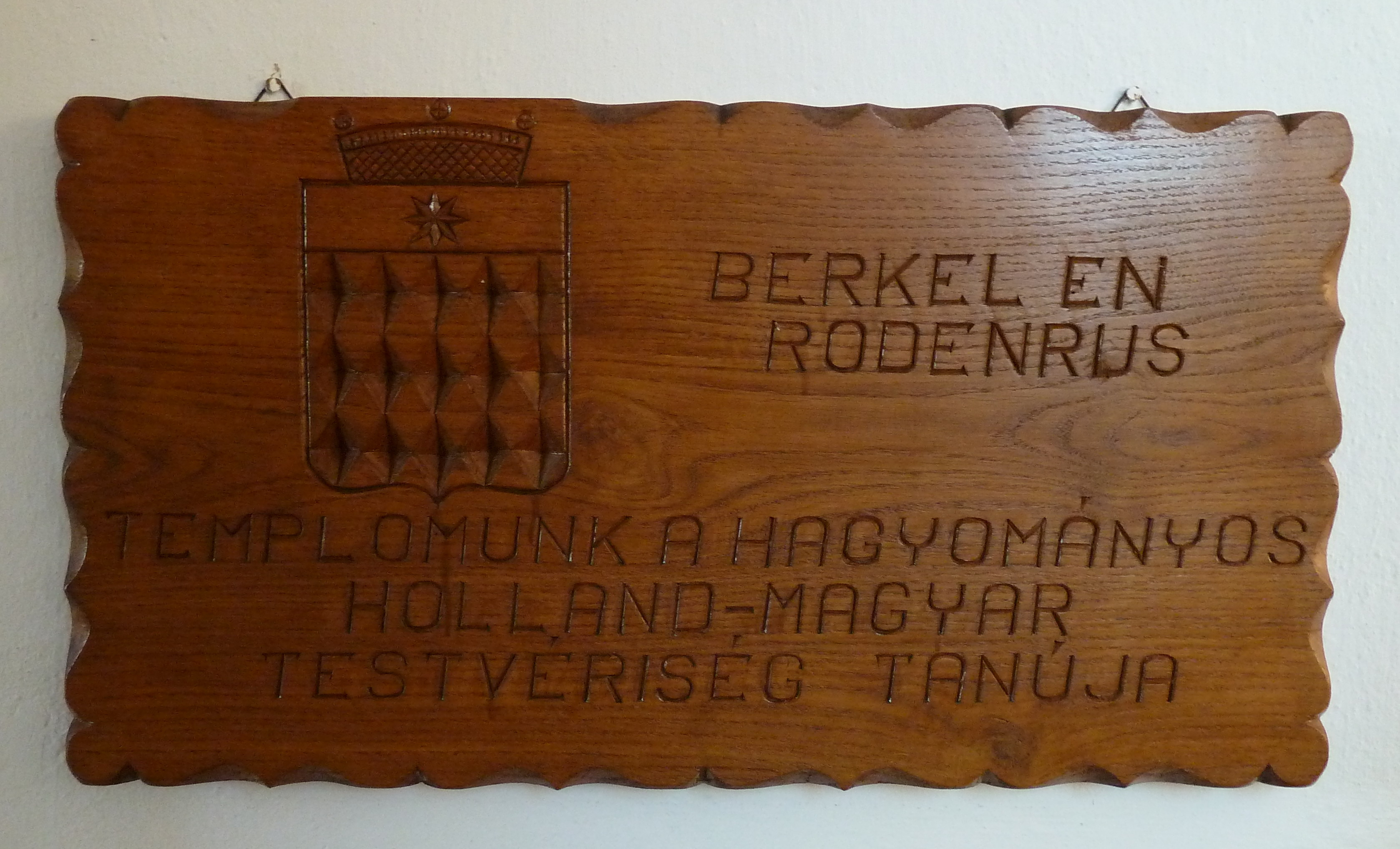 A holland-magyar barátság emléktáblája a bajánsenyei református templom belső falán, Bajánsenye